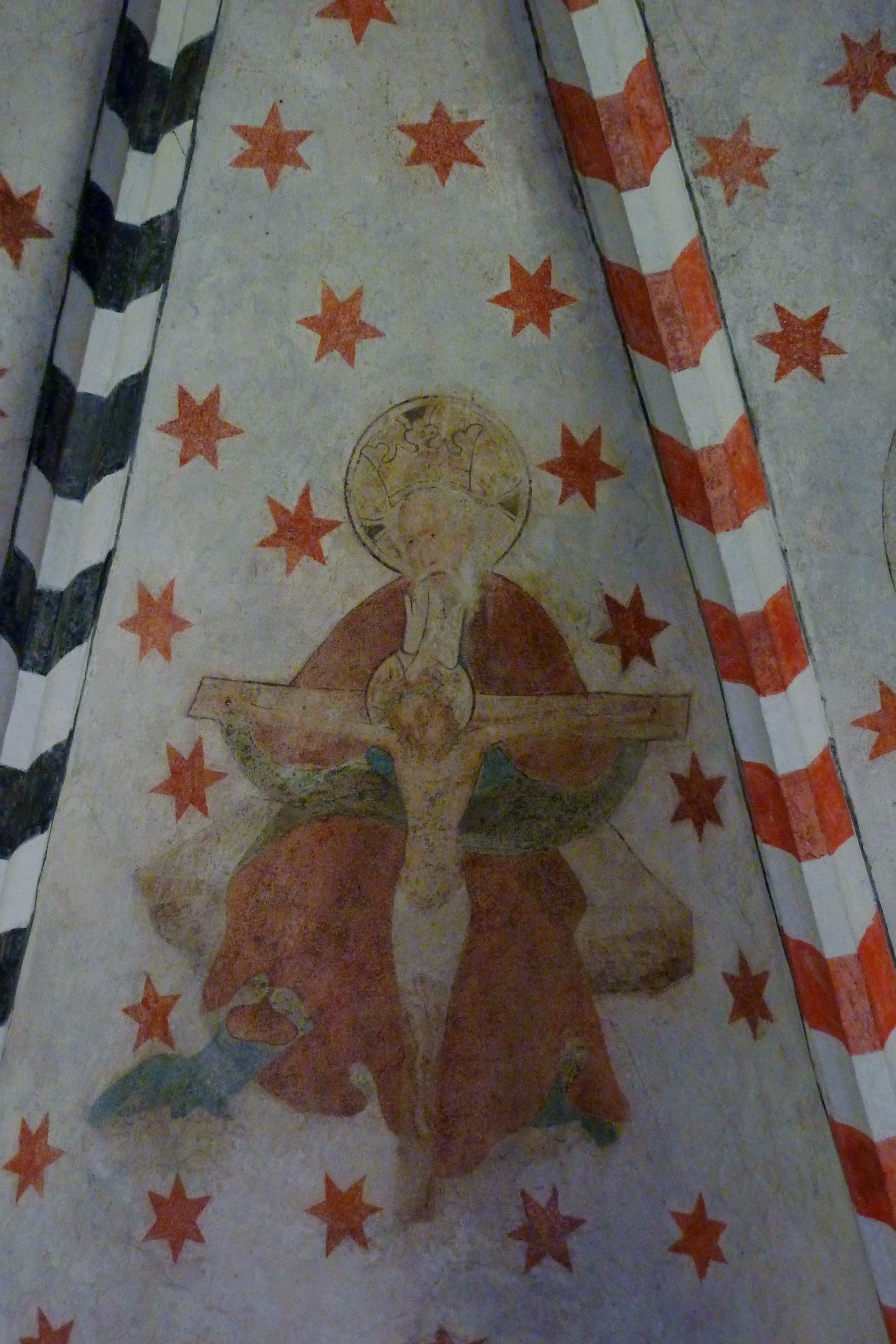 Katholische Pfarrkirche Kreuzauffindung in Elsig (Euskirchen), Gewölbemalerei im Chor aus dem späten 14. Jahrhundert, mit Darstellung des Gnadenstuhls